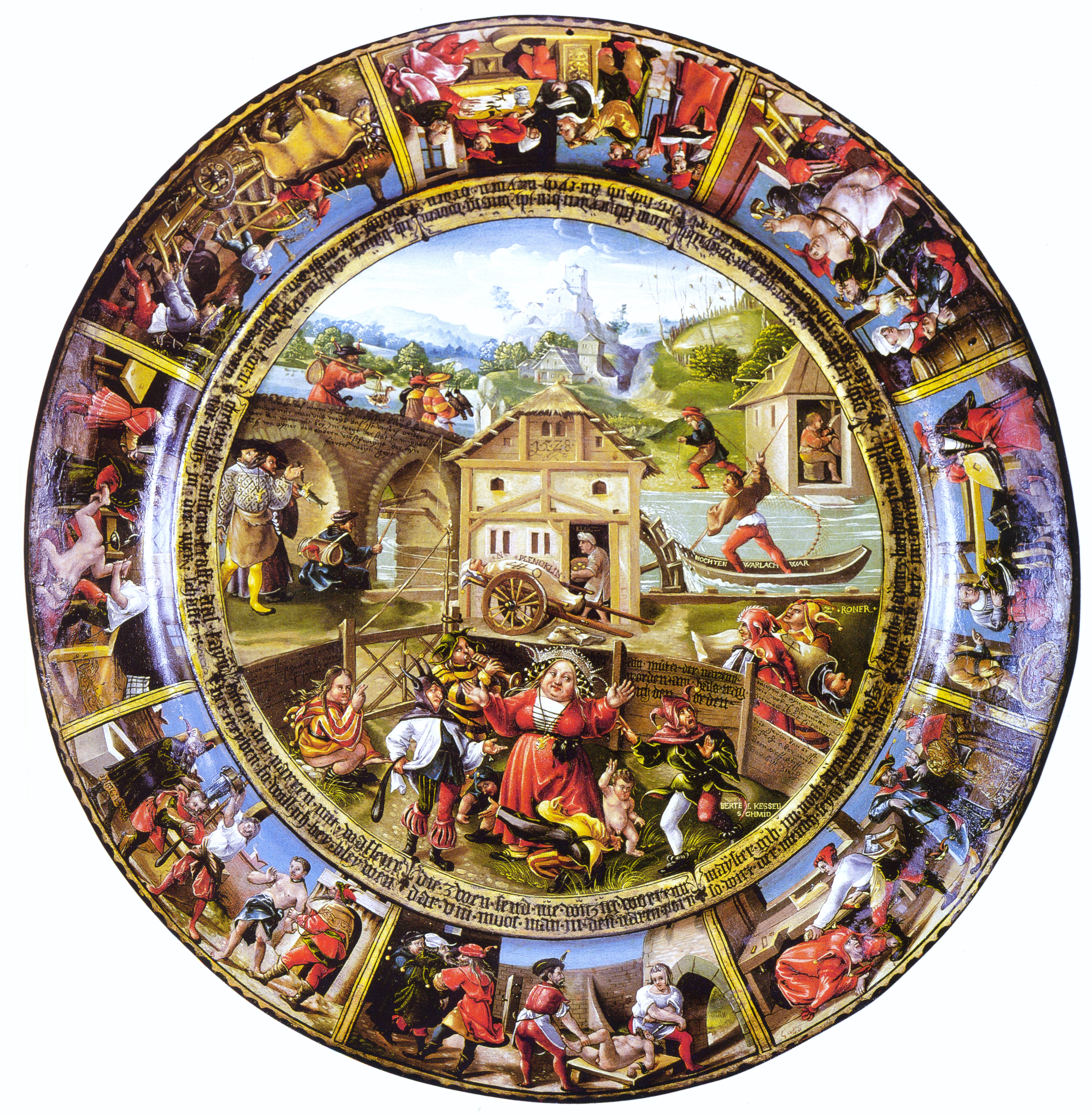 Narrenteller; Motiv: Narrenmutter und ihre sieben Söhne